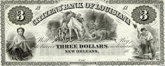 США. Три доллара. Гражданский банк Луизианы, Новый Орлеан.18... Односторонняя купюра